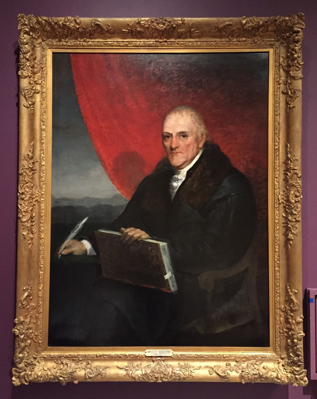 Unbekannter Künstler: Lorenzo Da Ponte (1749–1838), ca. 1820. Öl auf Leinwand, 142 x 112 cm. Avery Architectural & Fine Arts Library, Columbia University in the City of New York (C00.37).